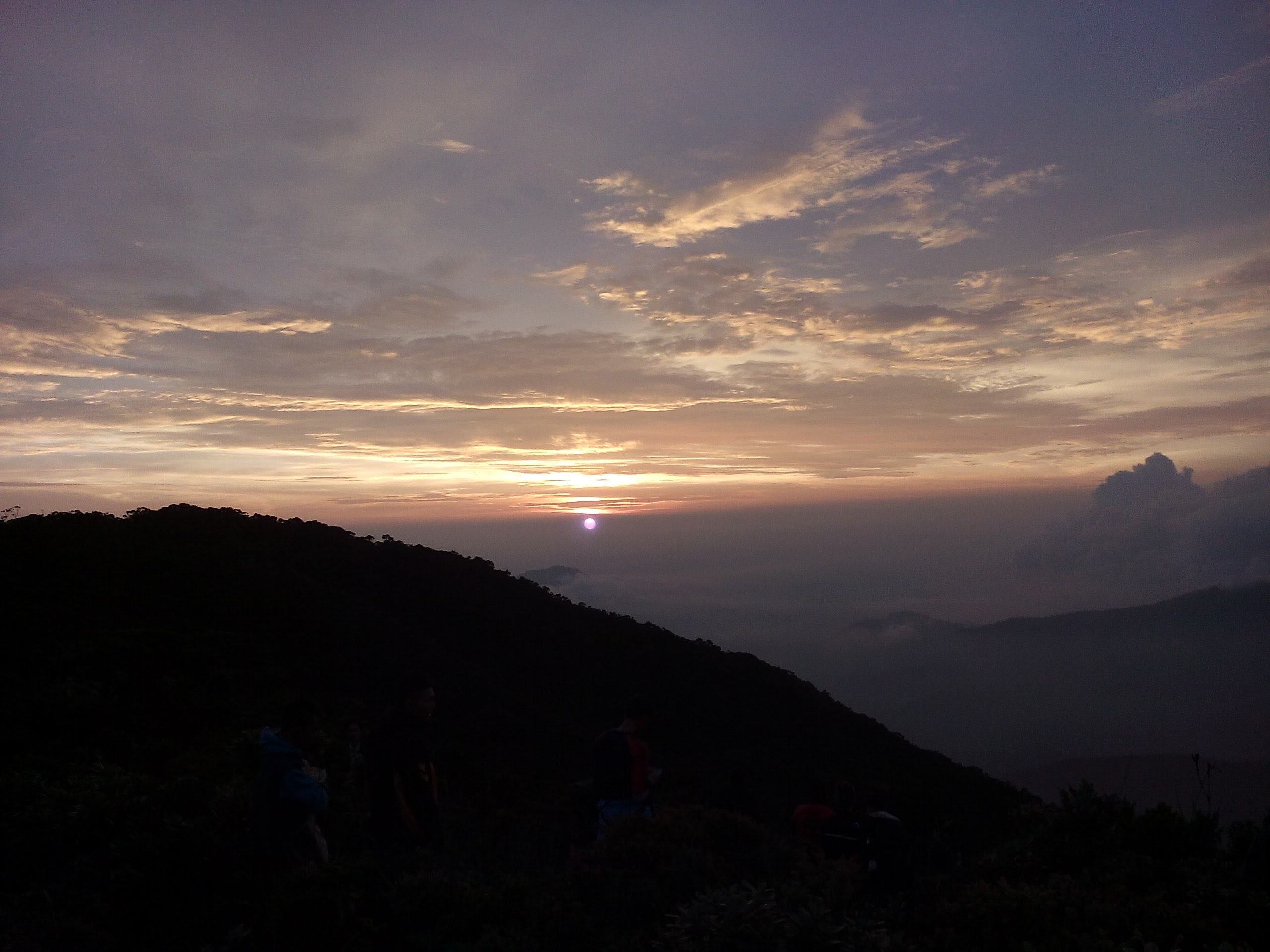 Matahari pagi berbentuk titik terang dari puncak Gunung Sibuatan